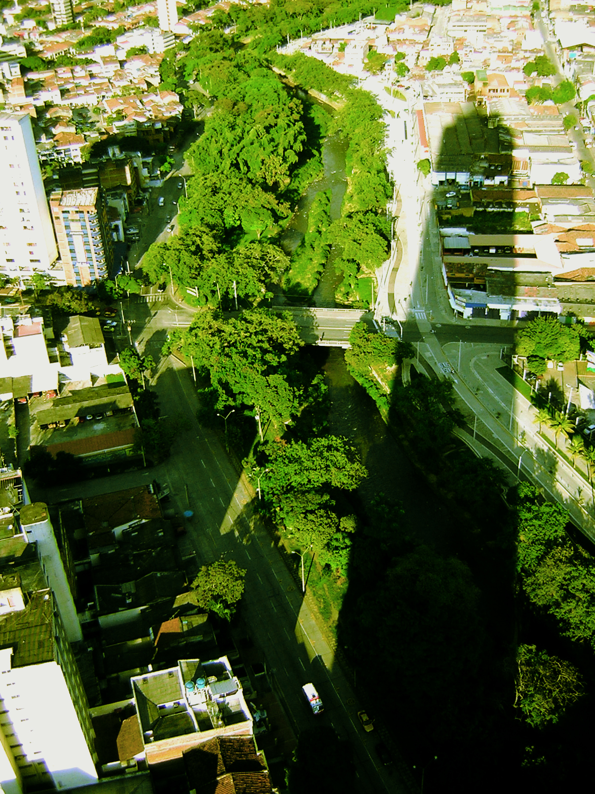 Vista Santiago de Cali desde la Torre de Cali.